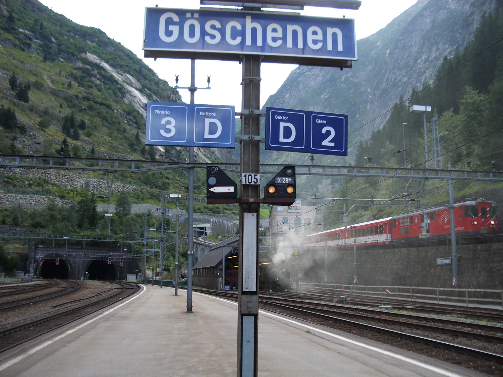 Göschenen UR, Switzerland